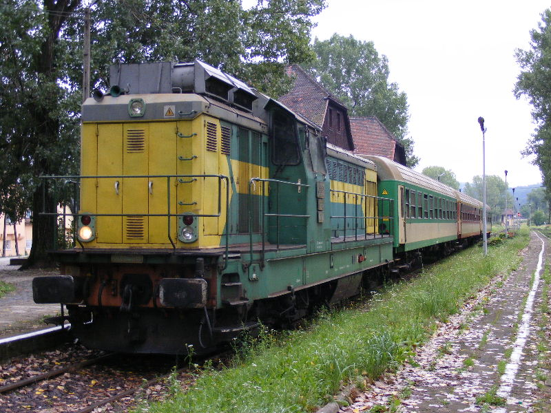 Spalinowóz SP32-210 na stacji Kudowa-Zdrój.